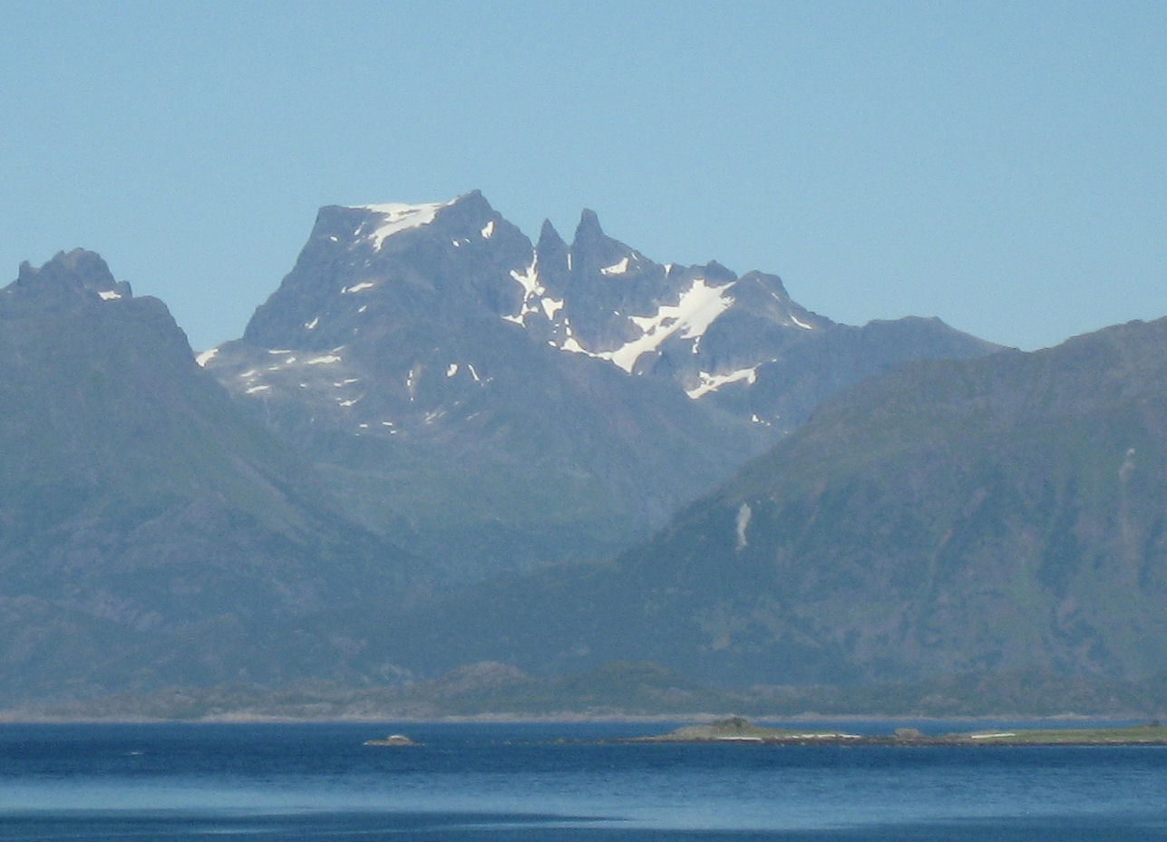 Bilde av fjellet Møysalen i Vesterålen. Tatt fra østre utløp av Sløverfjordtunellen.